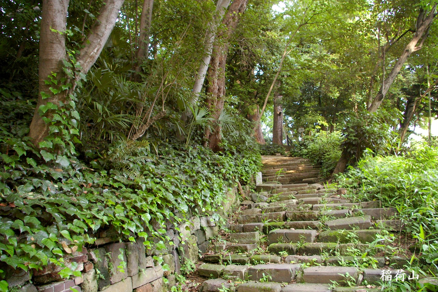 2009.5日本国内で塾生 (talk)が撮影。